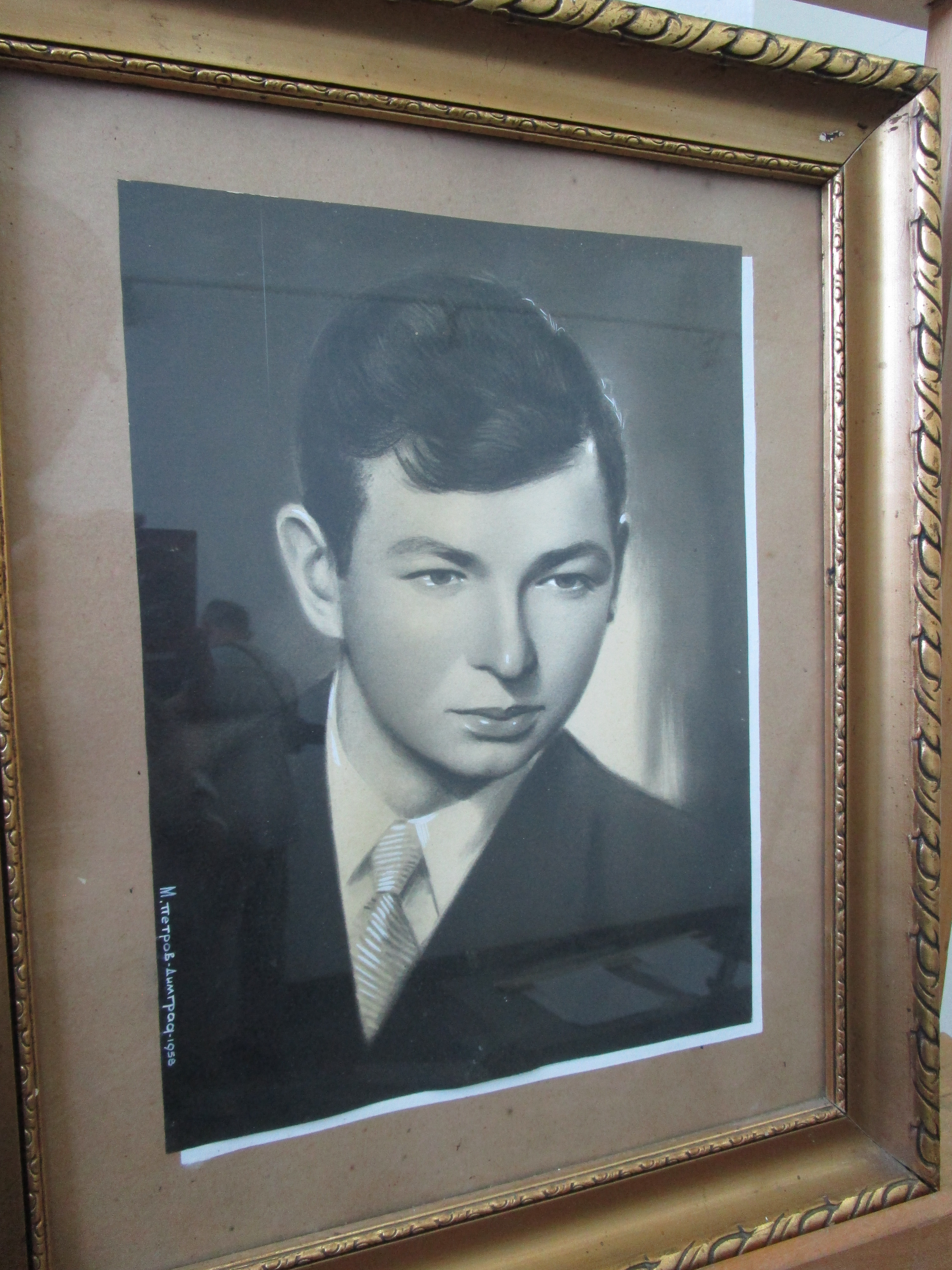 Српски (ћирилица): Галерија Методи Петров у Димитровграду.